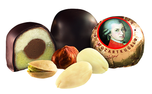 Mozartkugeln Schluckwerder